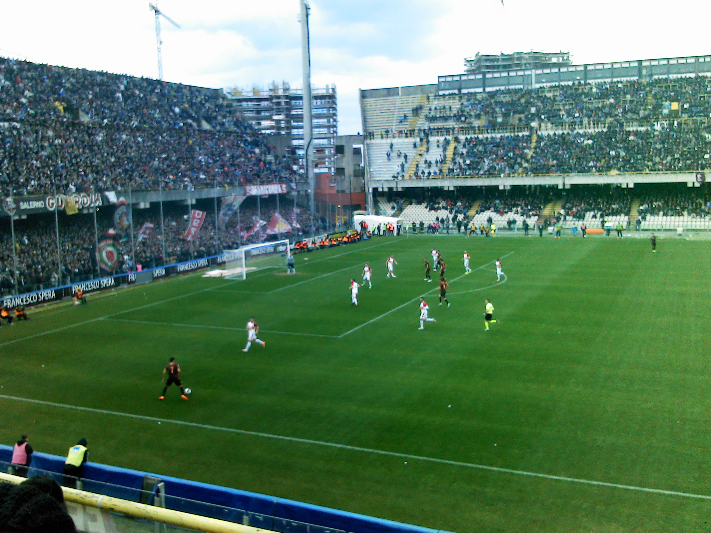 Azione di gioco in Salernitana-Benevento, secondo tempo